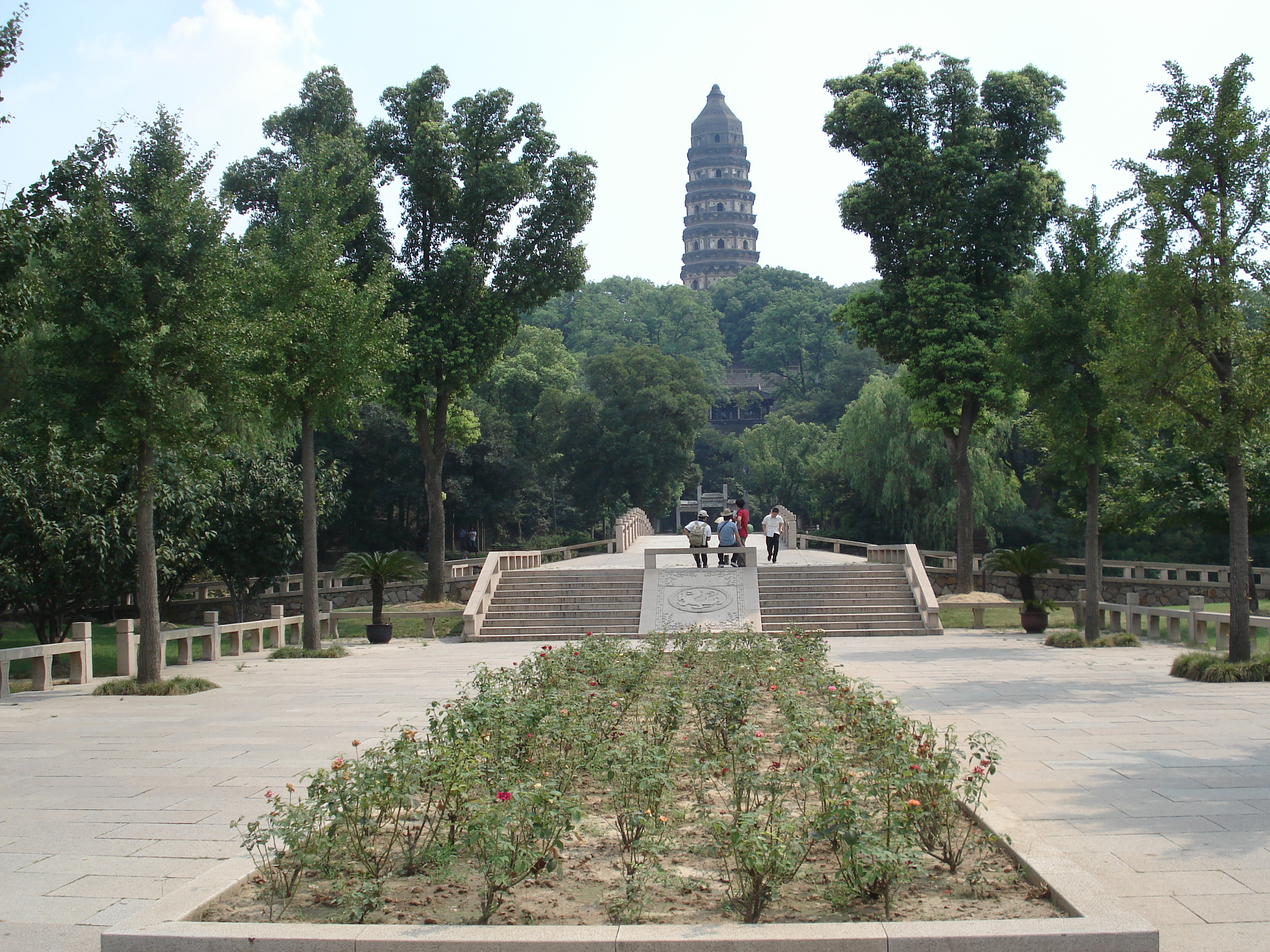 Tiger Hill and Yunyan Pagoda — in Suzhou, China